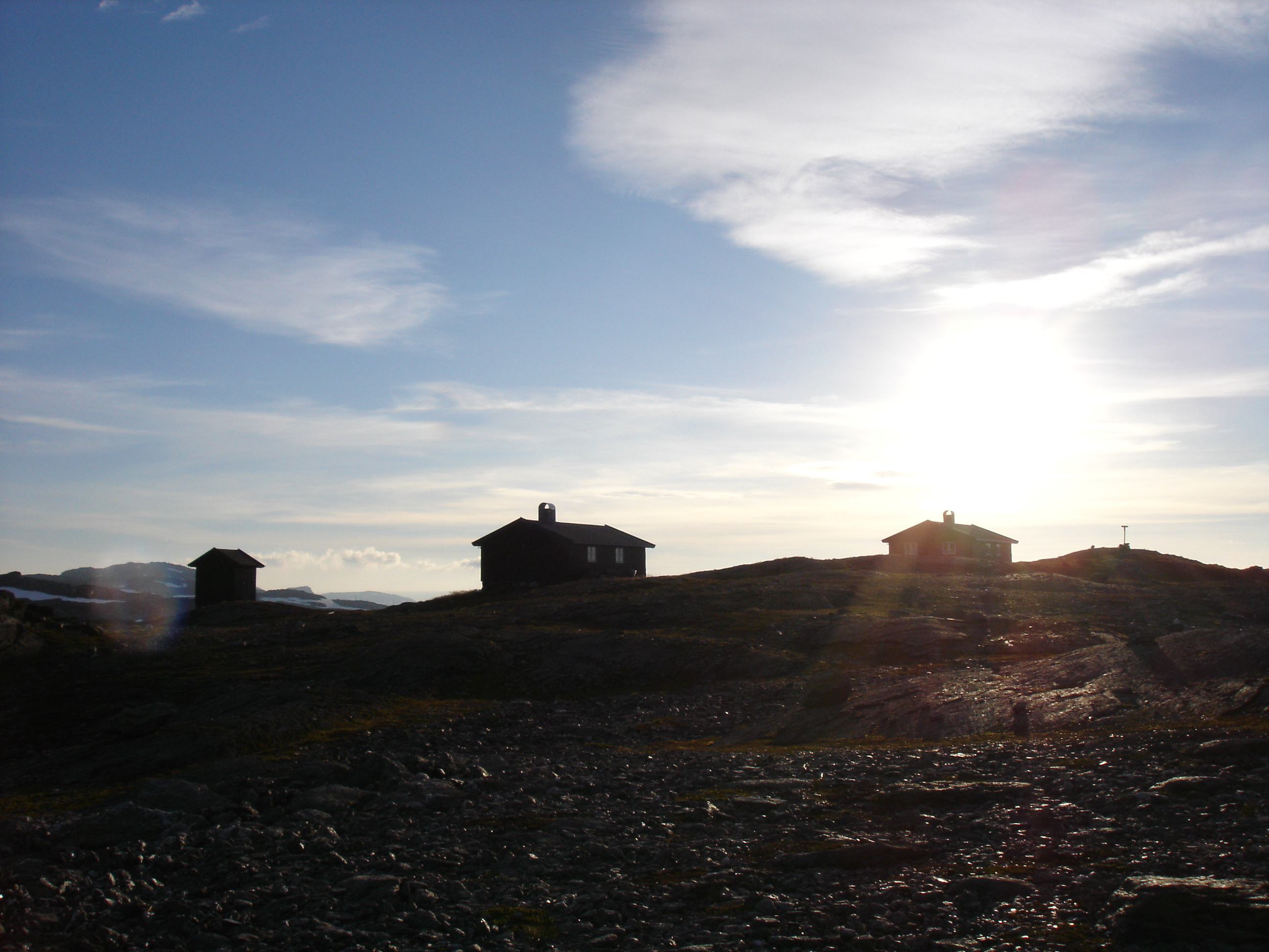 Bildet av Tyssevassbu Hytte sett fra veien til Torehytta, 09.09.2012